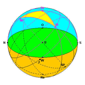 NautischesDreieck